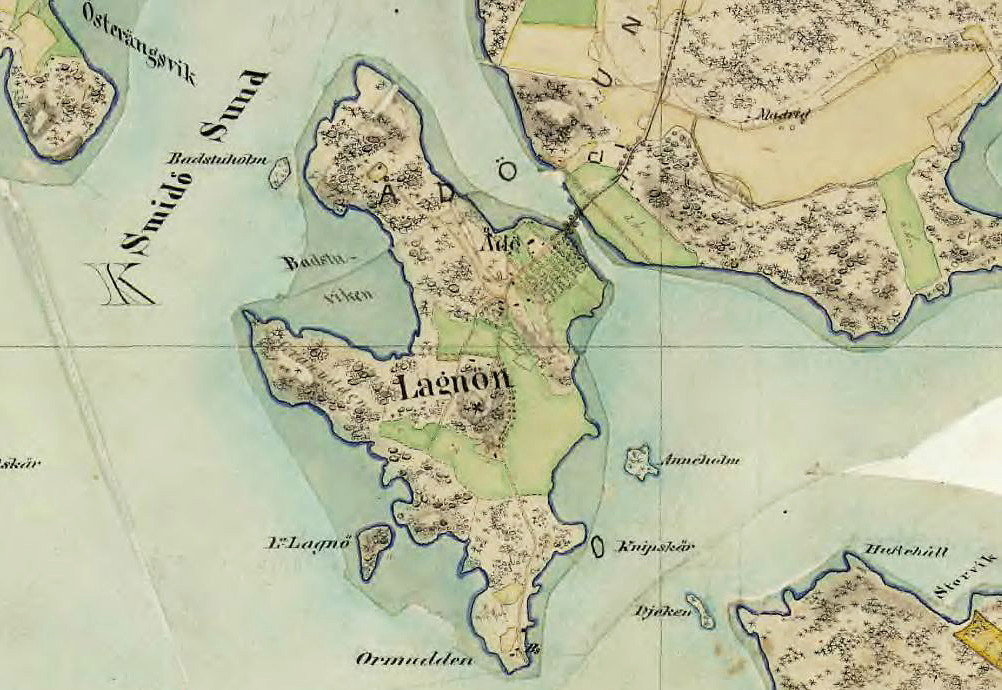 Ådö säteri och Langön i Upplands-Bro